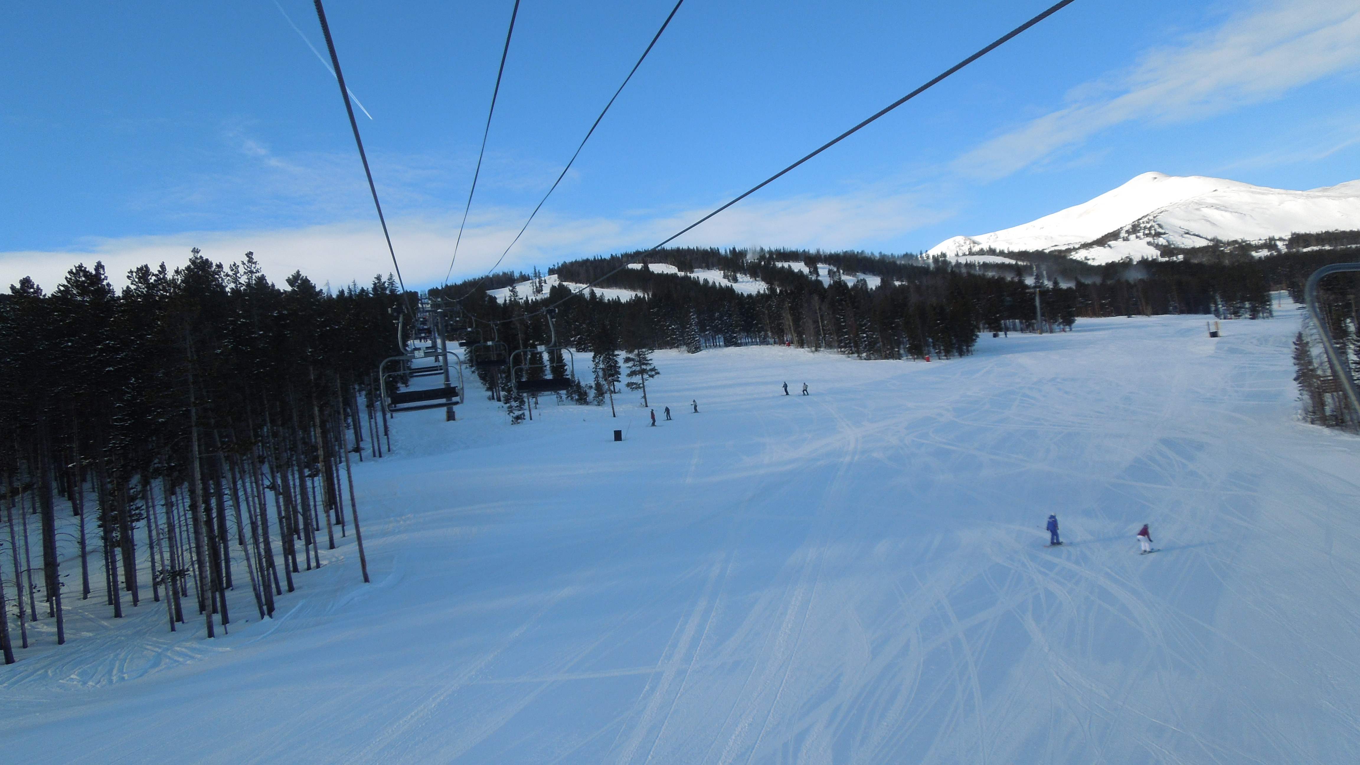 Peak 9 at Breckenridge Ski Resort. DReifGalaxyM31 (talk) 06:08, 15 January 2014 (UTC)